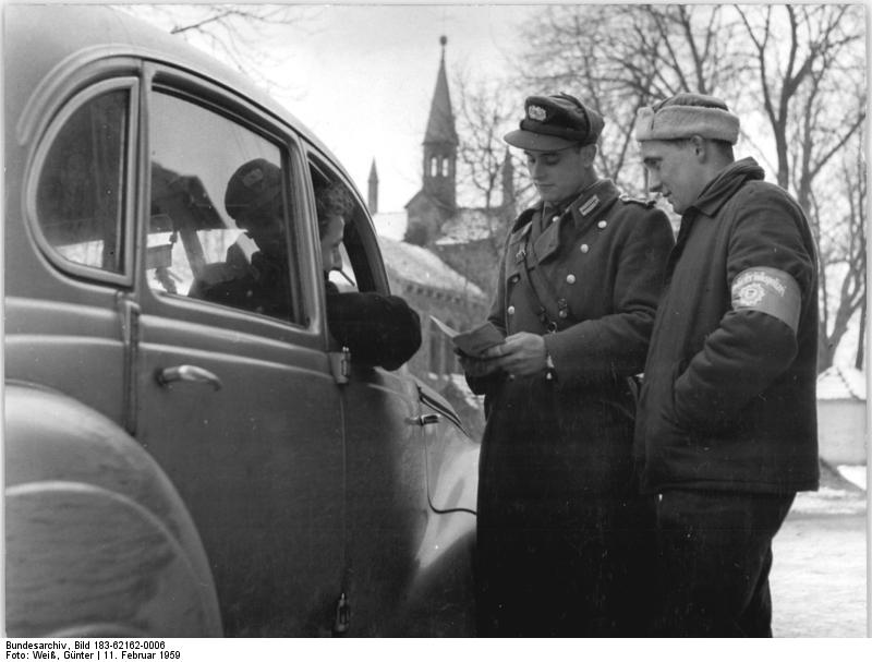 Fahrzeugkontrolle durch Volkspolizist und Helfer Zentralbild Weiß 11.2.1959 - Traktoristen kämpfen um den Titel "Brigade der sozialistischen Arbeit (siehe Begleittext) - UBz: Nicht nur in der praktischen Arbeit, sondern auch in der gesellschaftlichen Arbeit sind die Mitglieder der Jugendbrigade ihren Kollegen Vorbild. So sind sie z.B. alle in der FDJ organisiert. 9 Taktoristen sind Mitglieder der SED. 15 versehen ihren Dienst in der Kampfgruppe. Hier treffen wir den Traktoristen Hildebrandt, der ehrenamtlich als Helfer der Volkspolizei arbeitet, bei einer Kraftfahrerkontrolle, die ein Genosse der Vokspolizei durchführt.